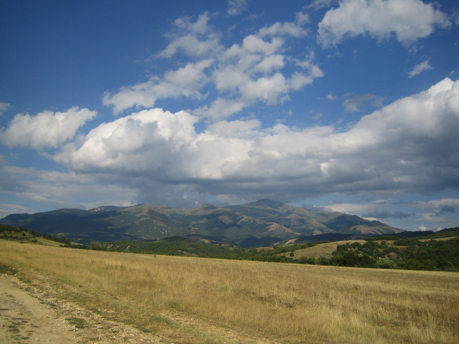 Поглед към Рила